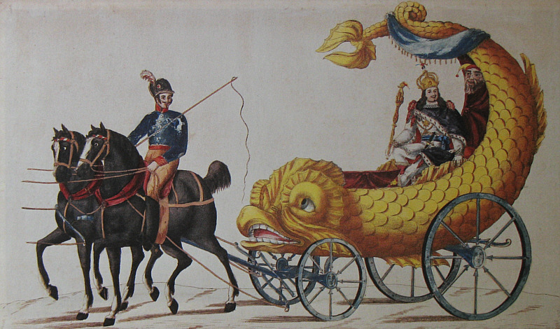 "Held Carneval" in seinem Rosenmontagszugwagen im Jahre 1824